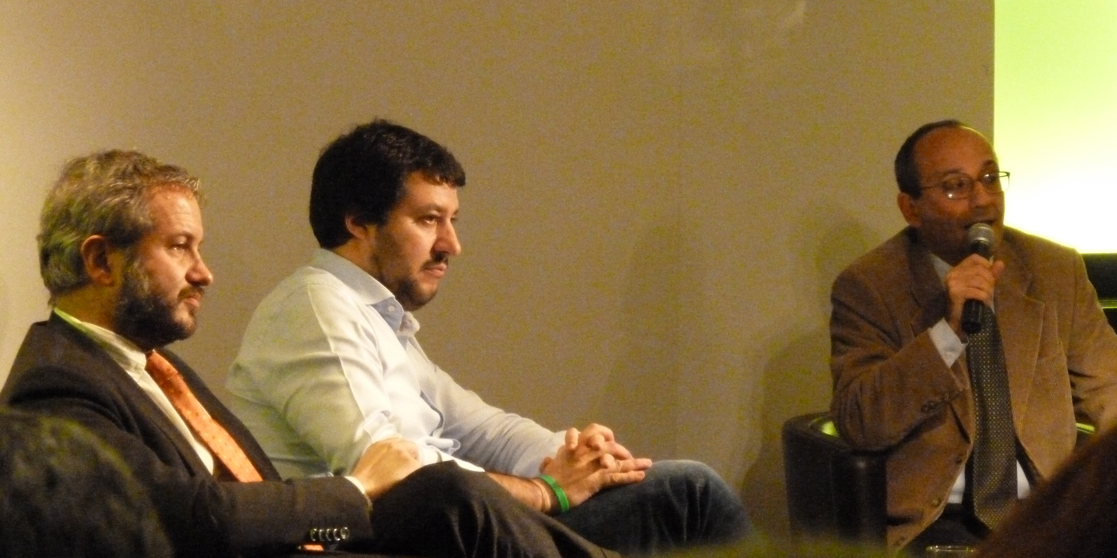 Convegno "No Euro Day" organizzato dalla Lega Nord all'Hotel dei Cavalieri a Milano, il 23 novembre 2013. Organizzatore, l'eurodeputato Matteo Salvini, mentre gli ospiti sono stati i professori Claudio Borghi, Antonio Rinaldi e Alberto Bagnai.